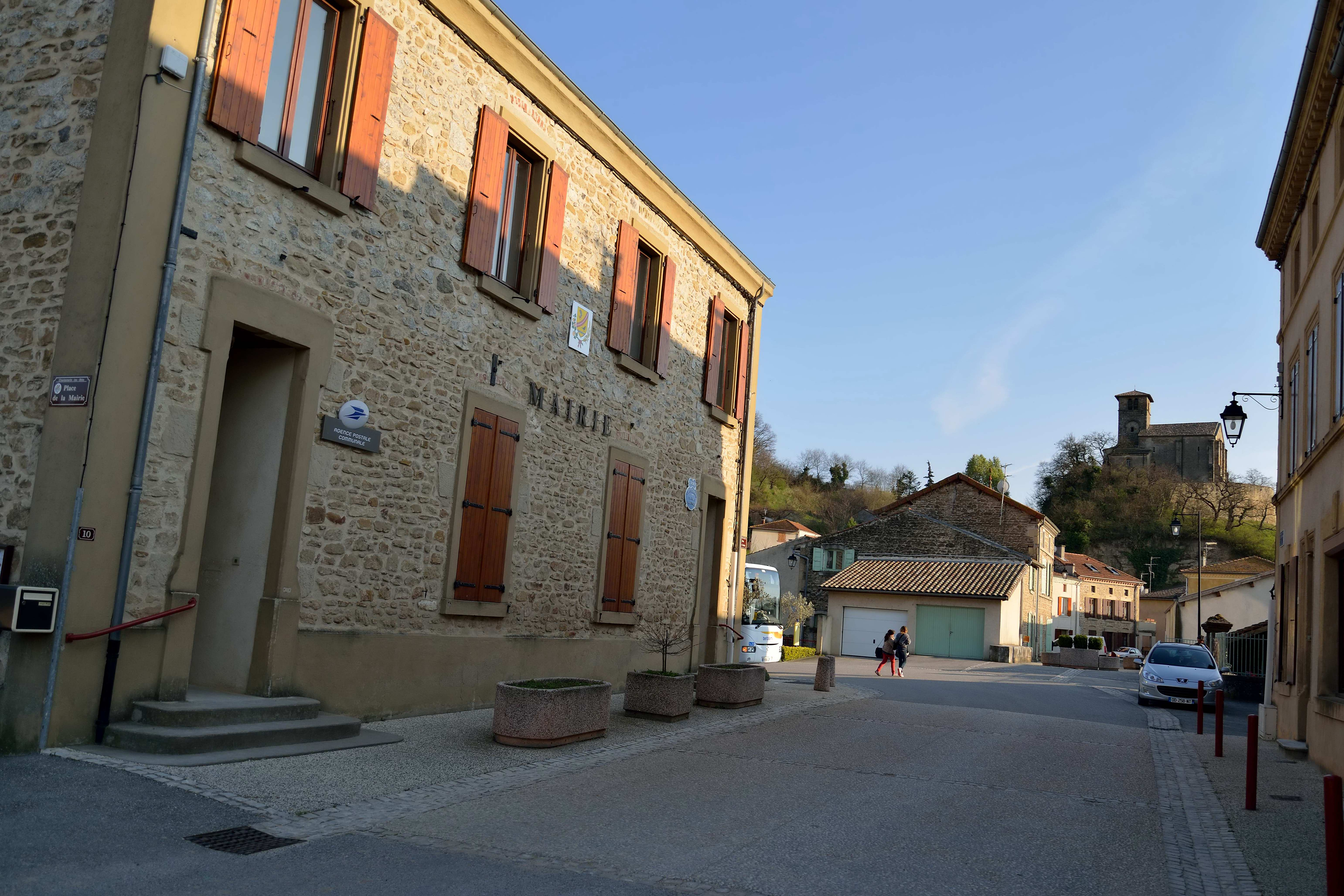 mairie